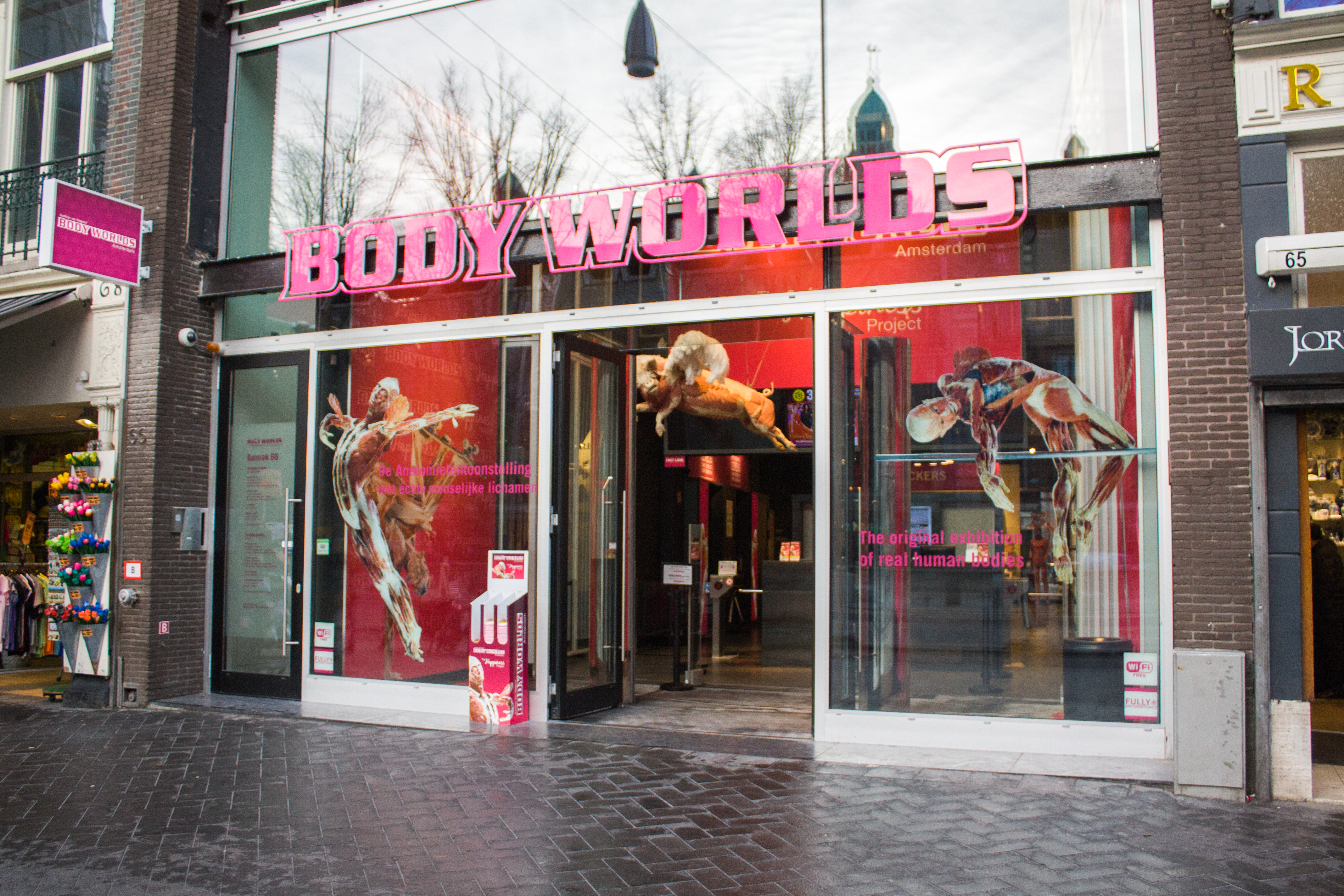 Amsterdam